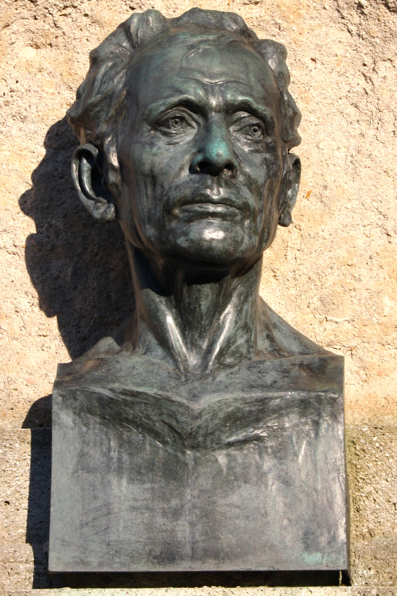 Porträtbüste am Grab von Ludwig Martinelli am Zentralfriedhof in Wien.